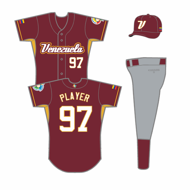 Away Kit